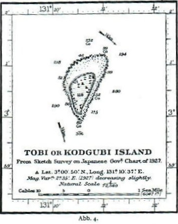 Carte de l'île de Tobi faite à partie de données du gouvernement japonais (1927). Page 36 du livre de Eilers.